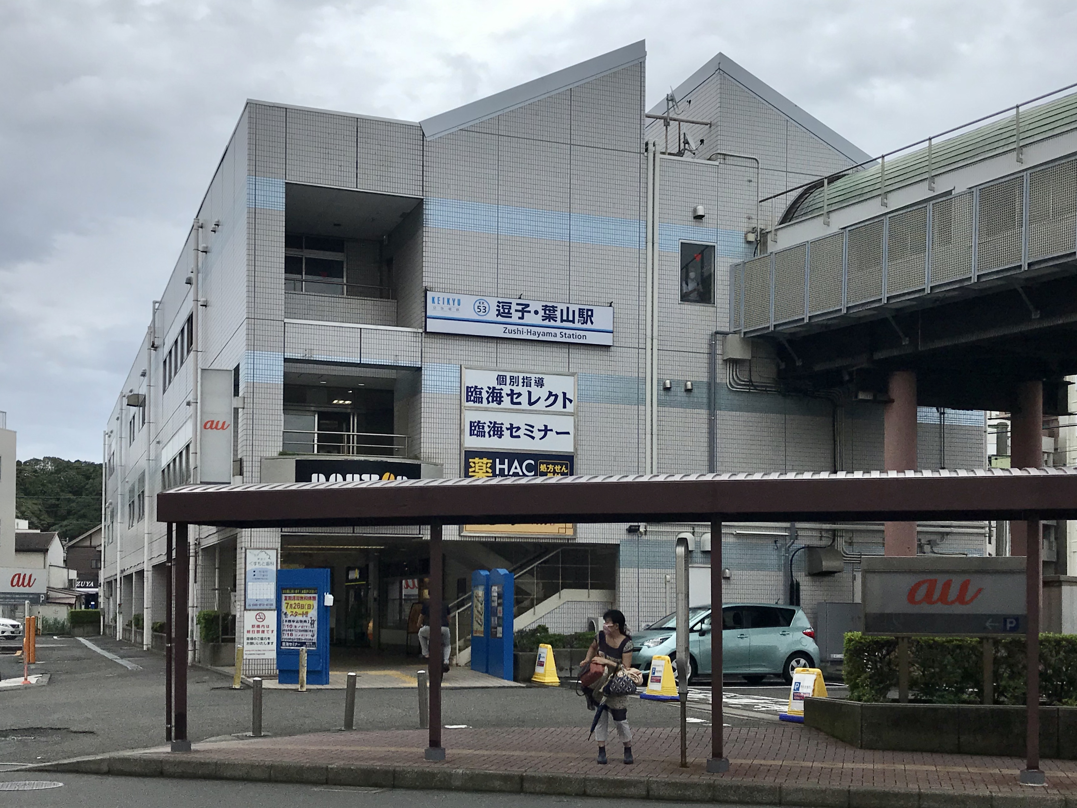 逗子・葉山駅北口